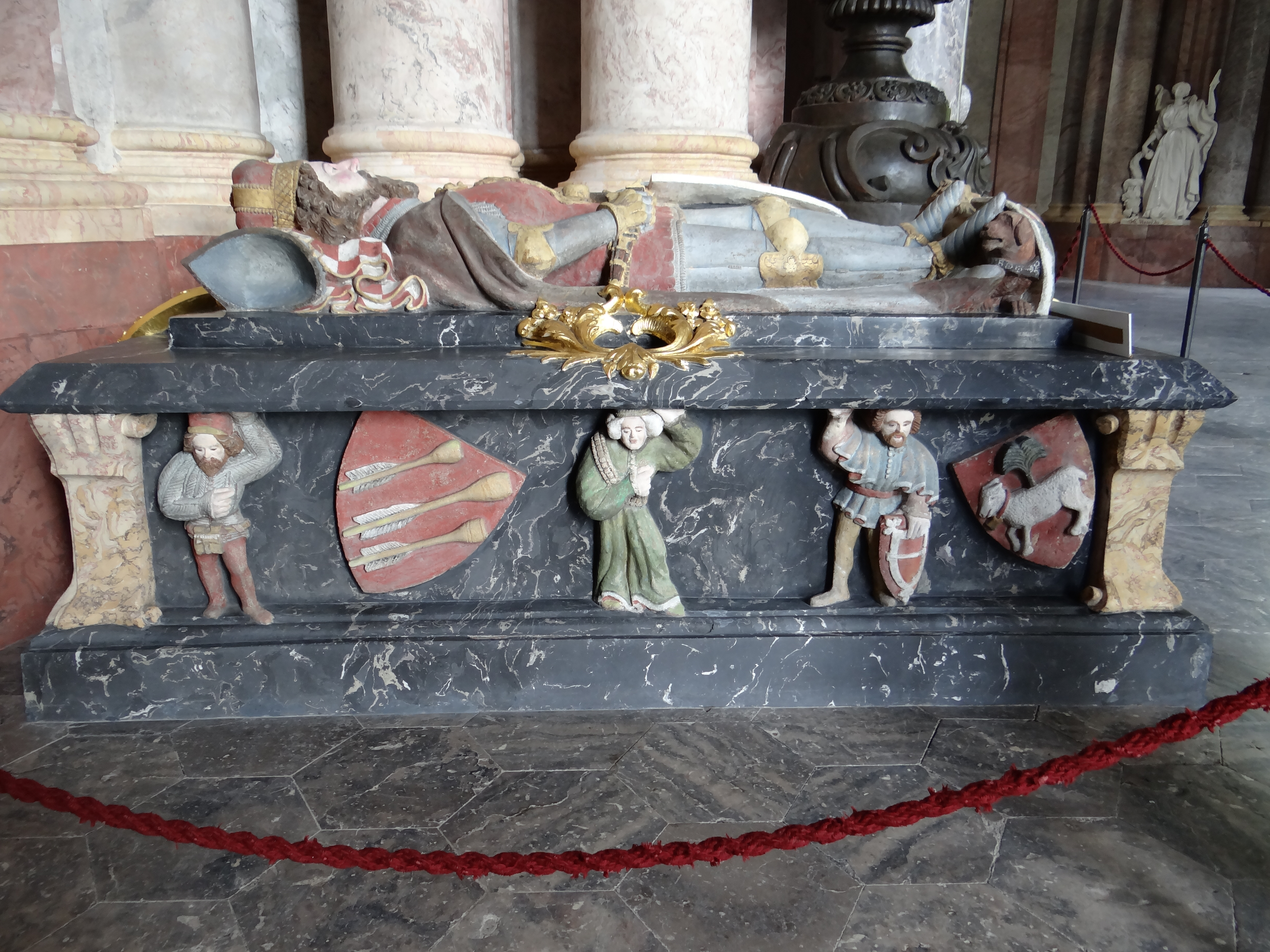 Krzeszów, mauzoleum Piastów, 1734, 1839